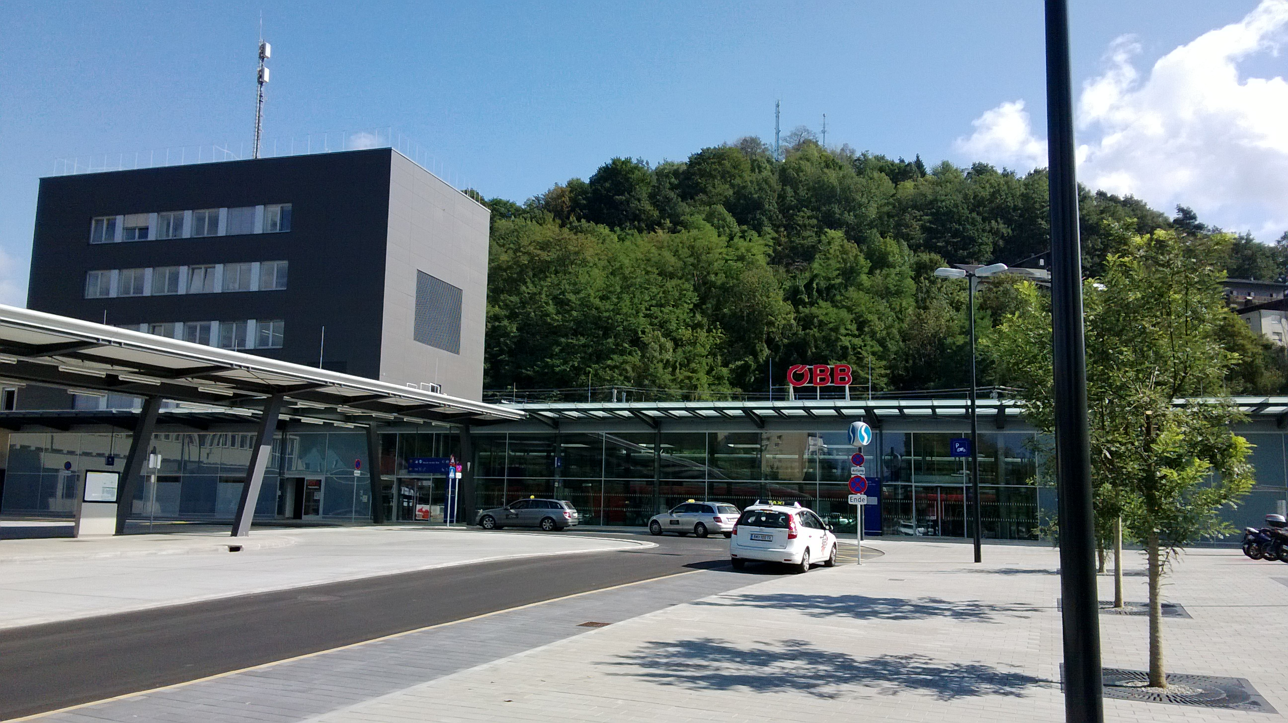 Der neue Bahnhof Bruck an der Mur - Bahnhofshalle und Vorplatz